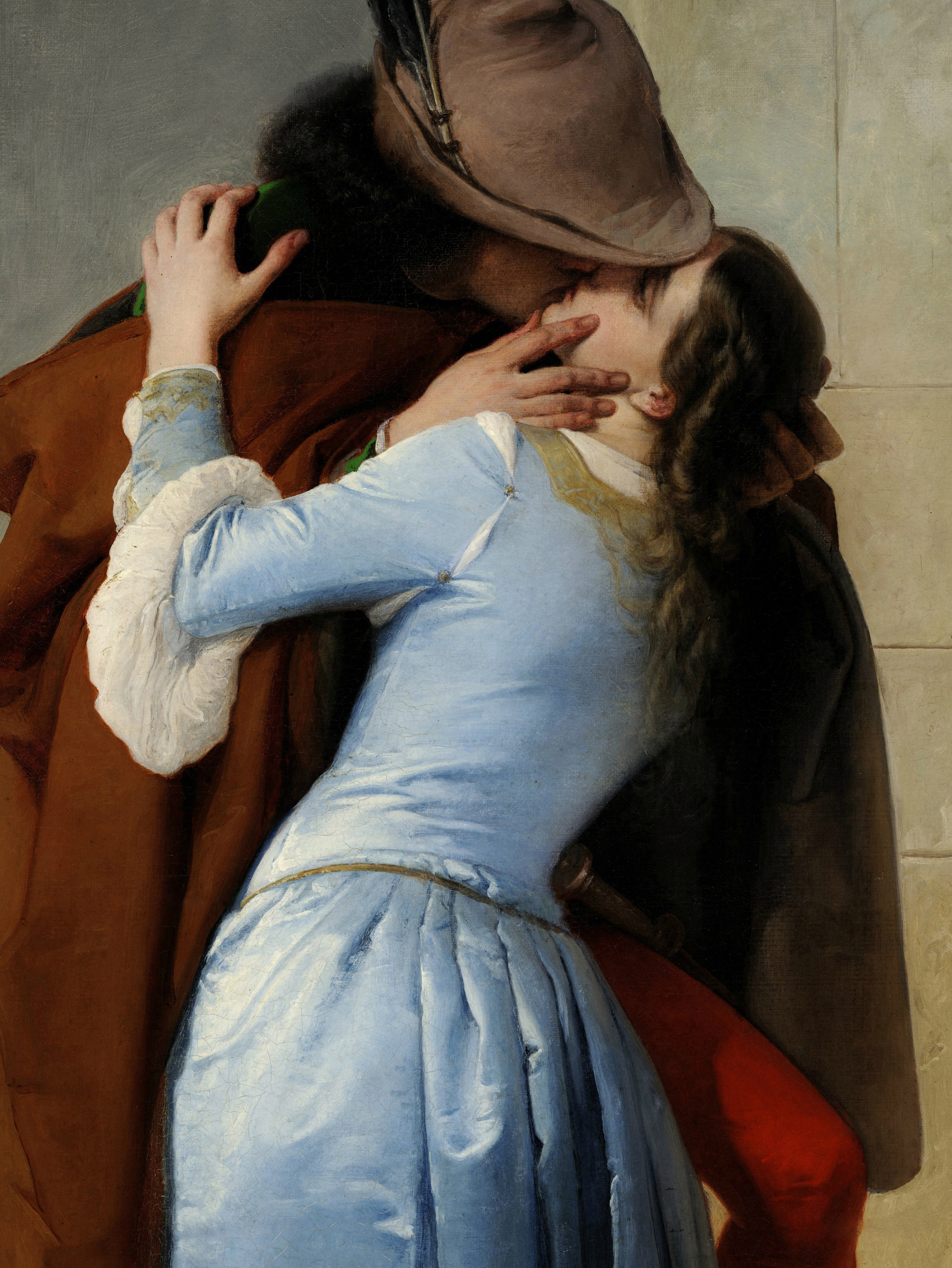 Dettaglio del quadro per mostrare il tricolore